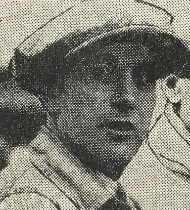 Lucien Desvaux en 1928.